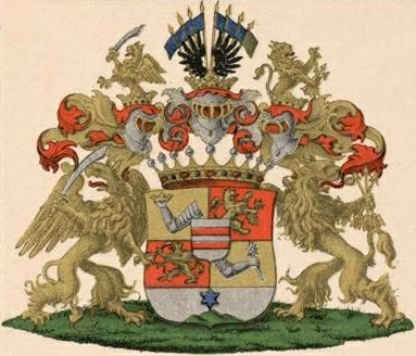 Mengdeni suguvõsa krahvivapp